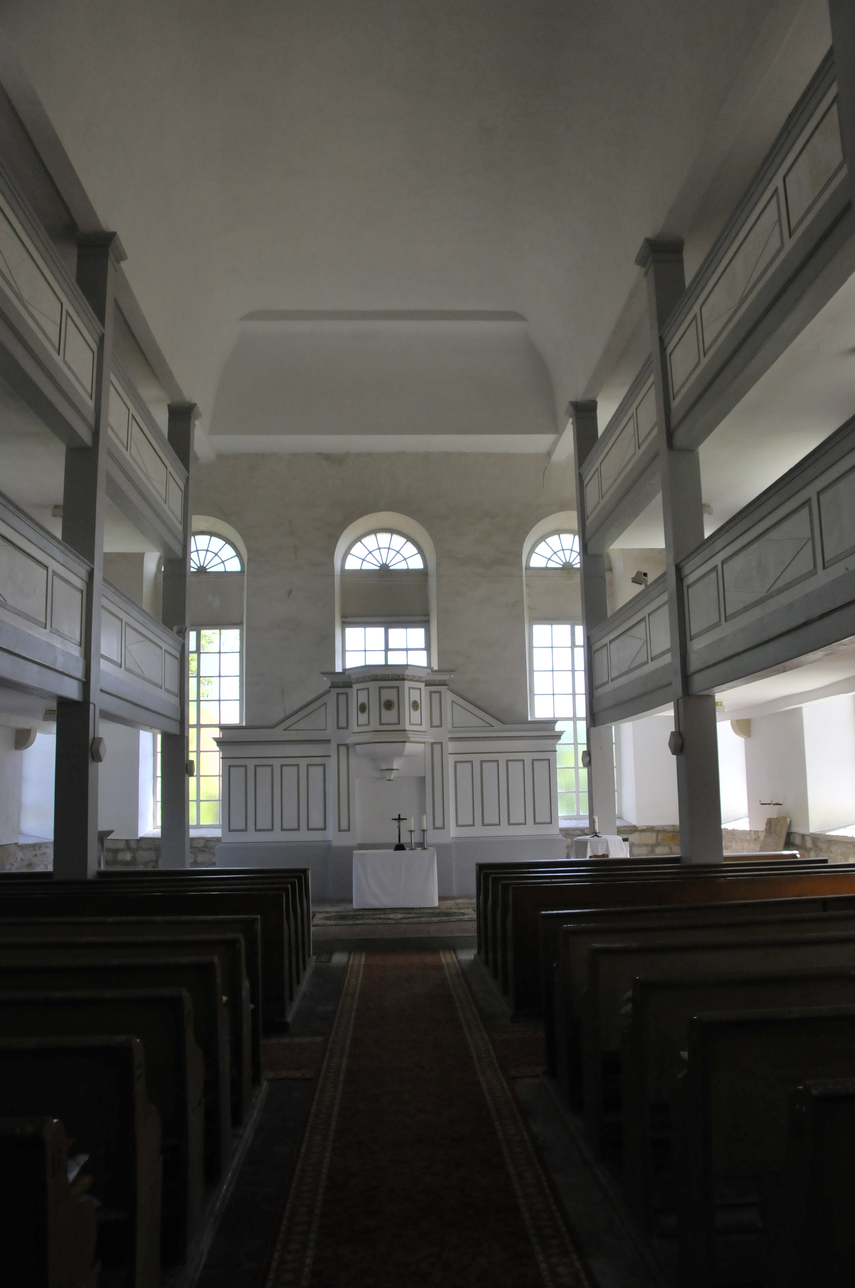 Frienstedt, Kircheninneres